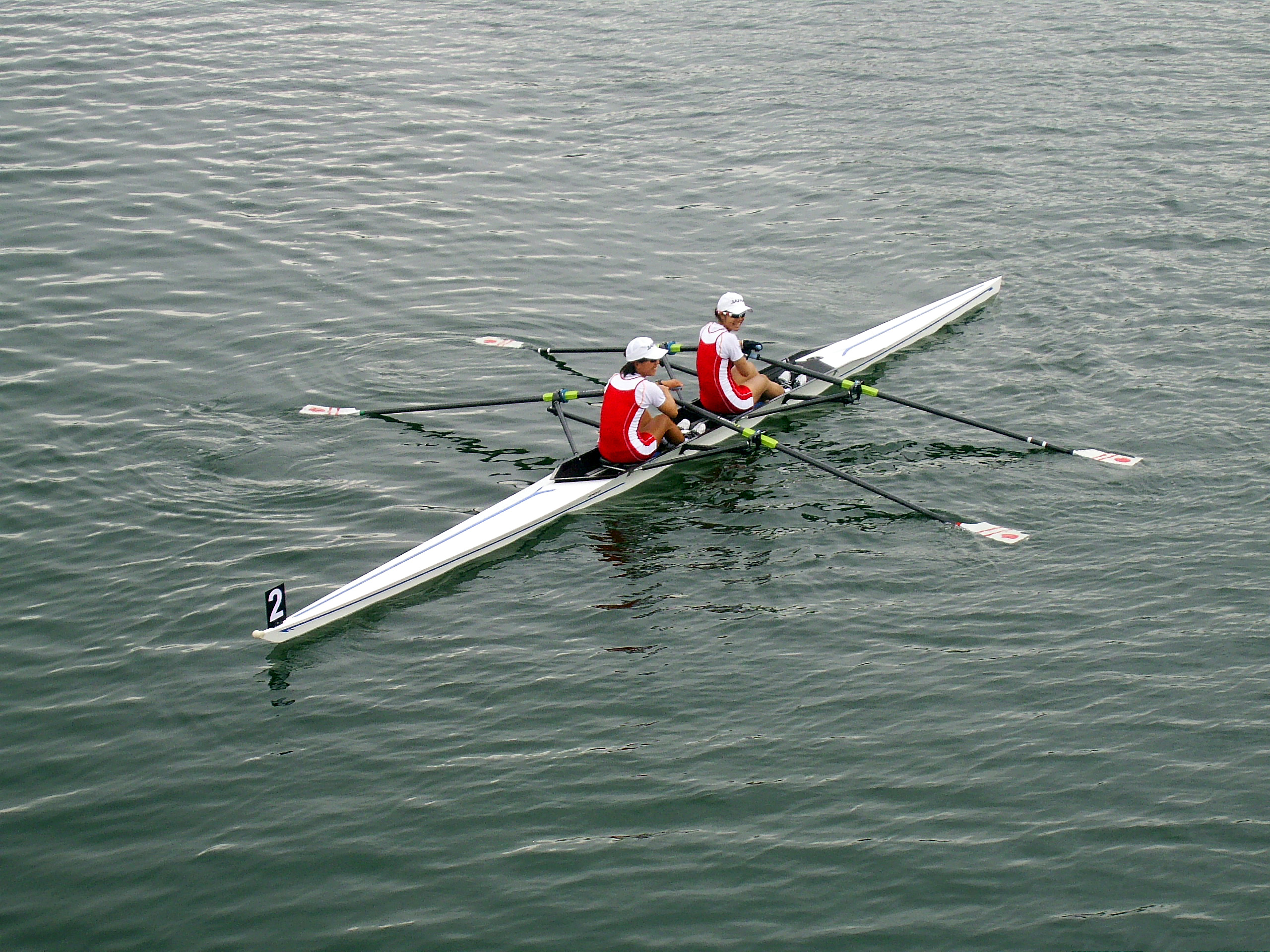 中文（香港）: 2009年東亞運動會賽艇比賽女子輕量級雙人雙槳艇銀牌得主日本隊